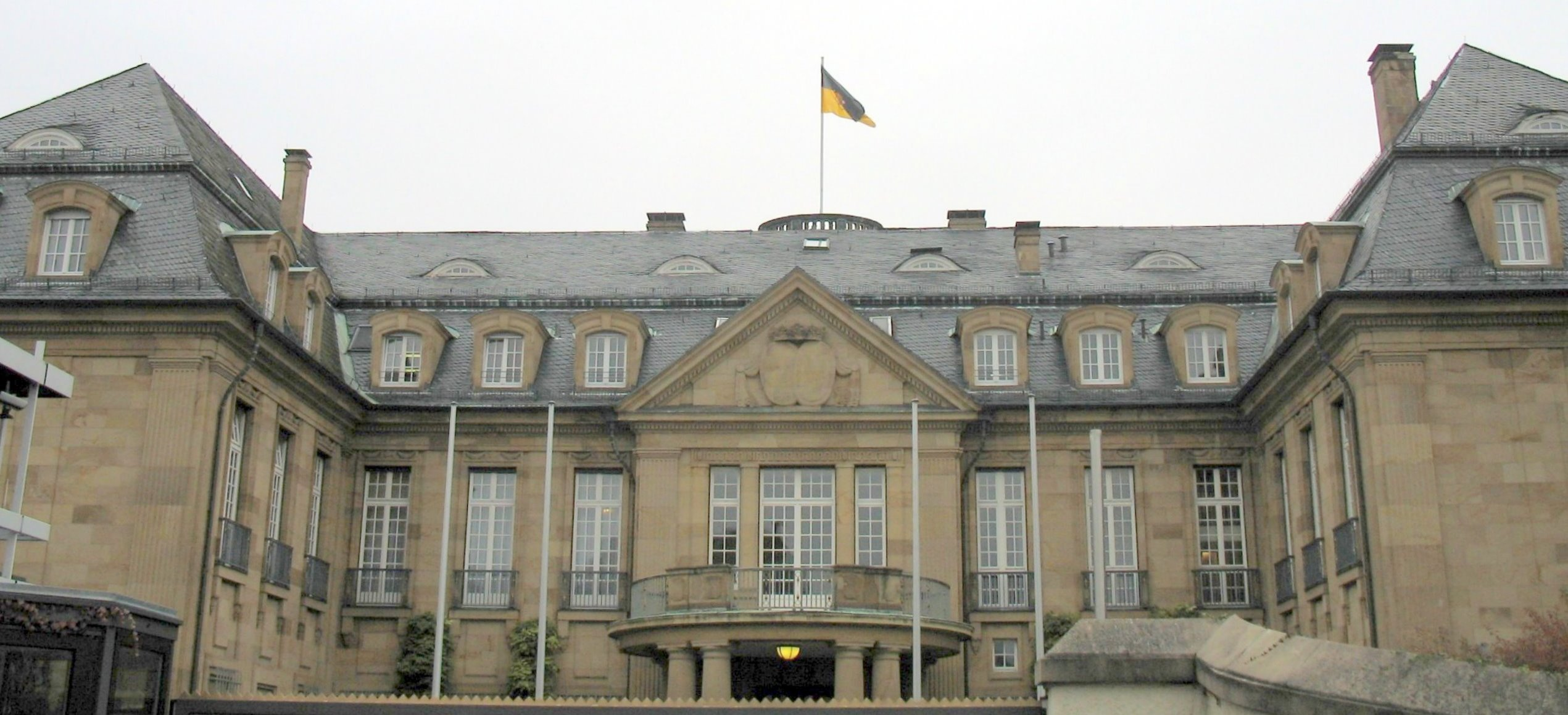 Ansicht der Villa Reitzenstein (Ostseite)